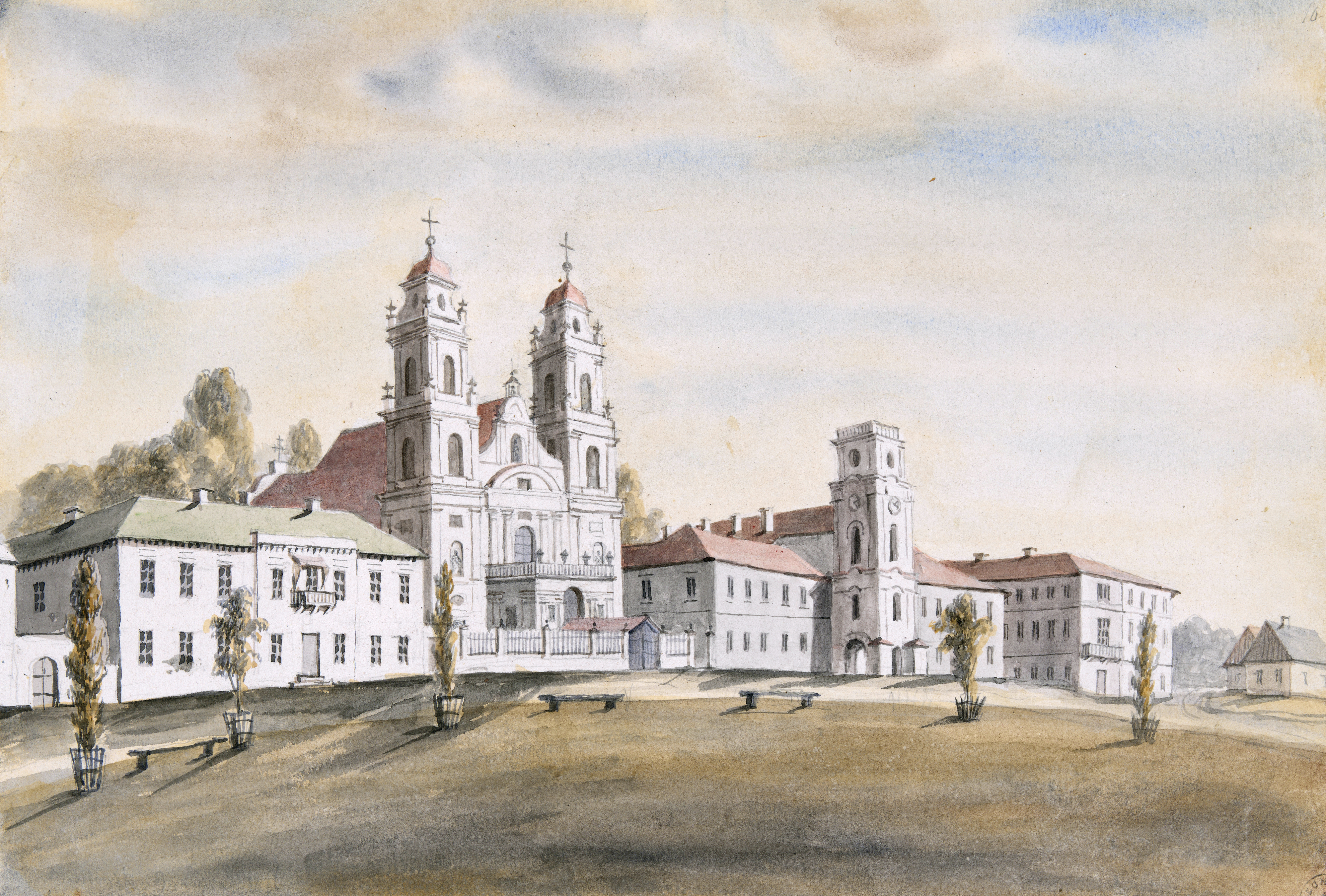 Беларуская (тарашкевіца): Менск (Miensk), пляц Высокі Рынак (plac Vysoki Rynak). Катэдра і калегіюм езуітаў.